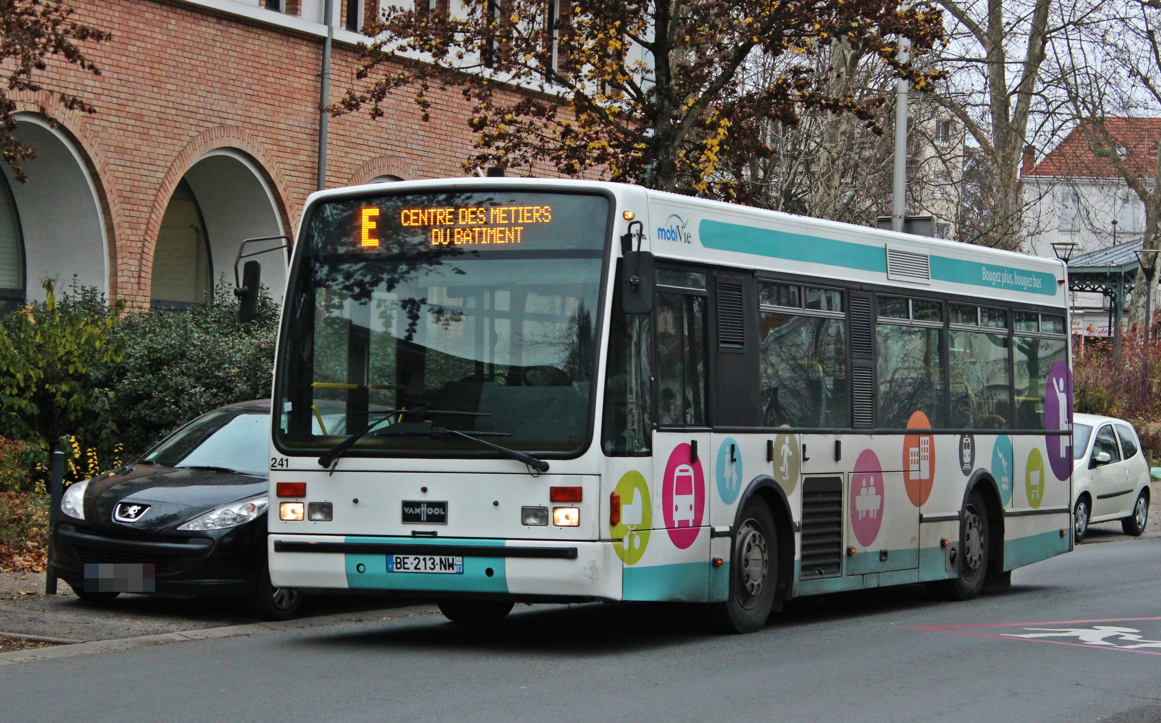 VanHool A308 n°241 de Kéolis Vichy sur la ligne E du réseau MobiVie de Vichy